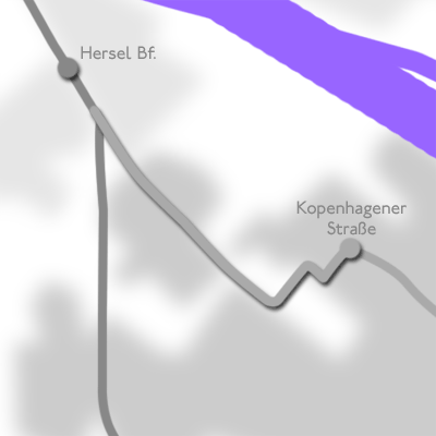 Karte der Stadtbahn Bonn beziehungsweise des geplanten Teilstücks von Auerberg über Buschdorf nach Hersel.